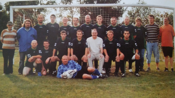 Oddíl muži (rok 2010)